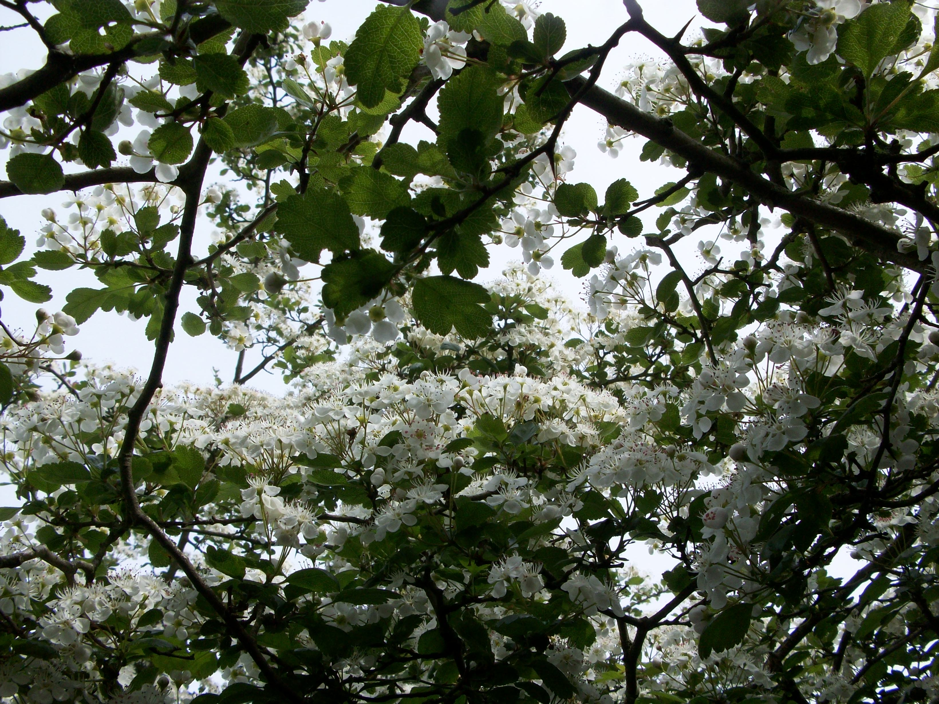 le seul Crataegus laevigata trouvé sur la commune de coudekerque branche il fleurie entre les pruneliers et les aubépines